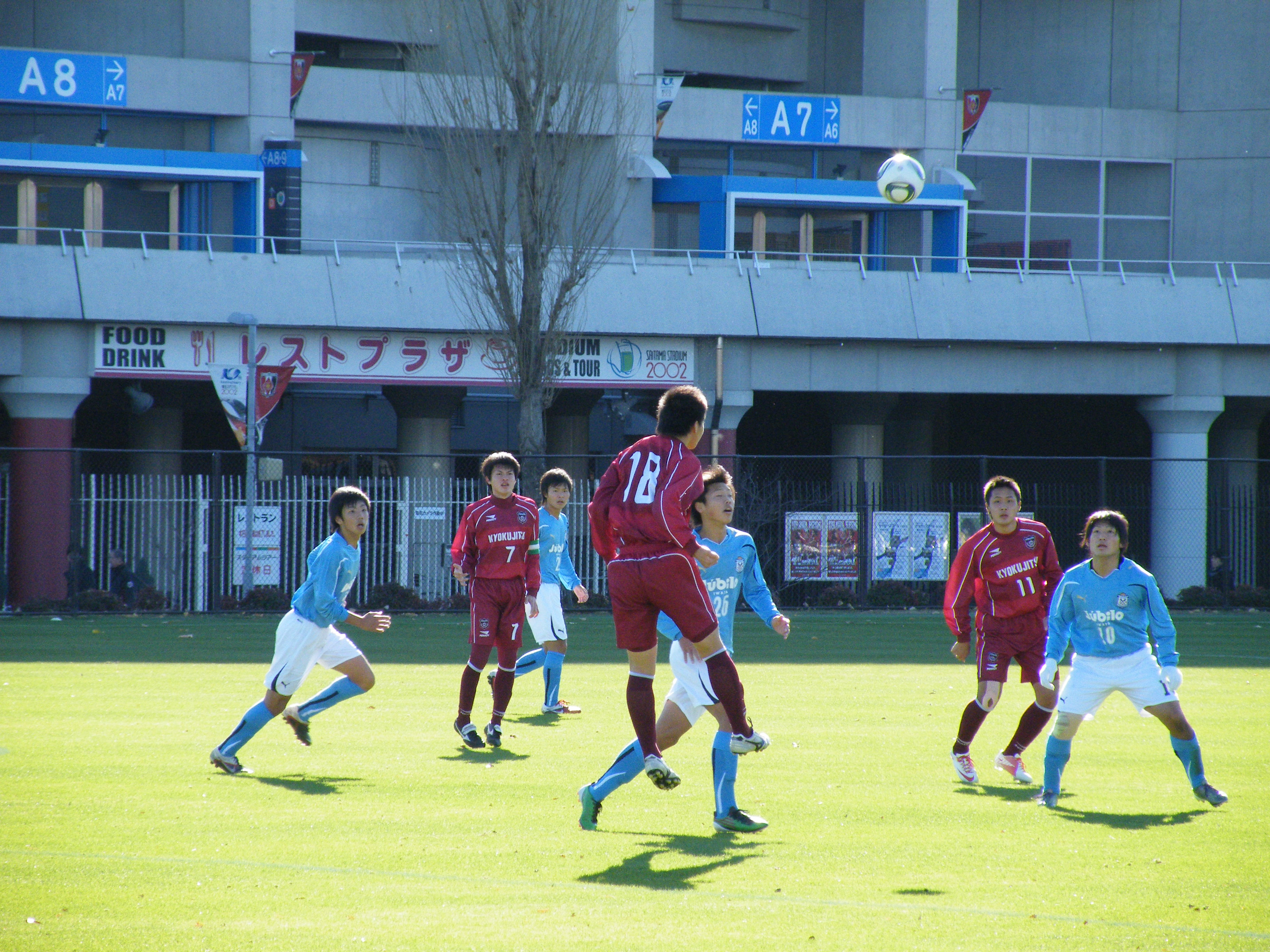 高円宮杯U-18サッカーリーグ2011・プレミアリーグ2012参入戦。ジュビロ磐田U-18対旭川実業高校